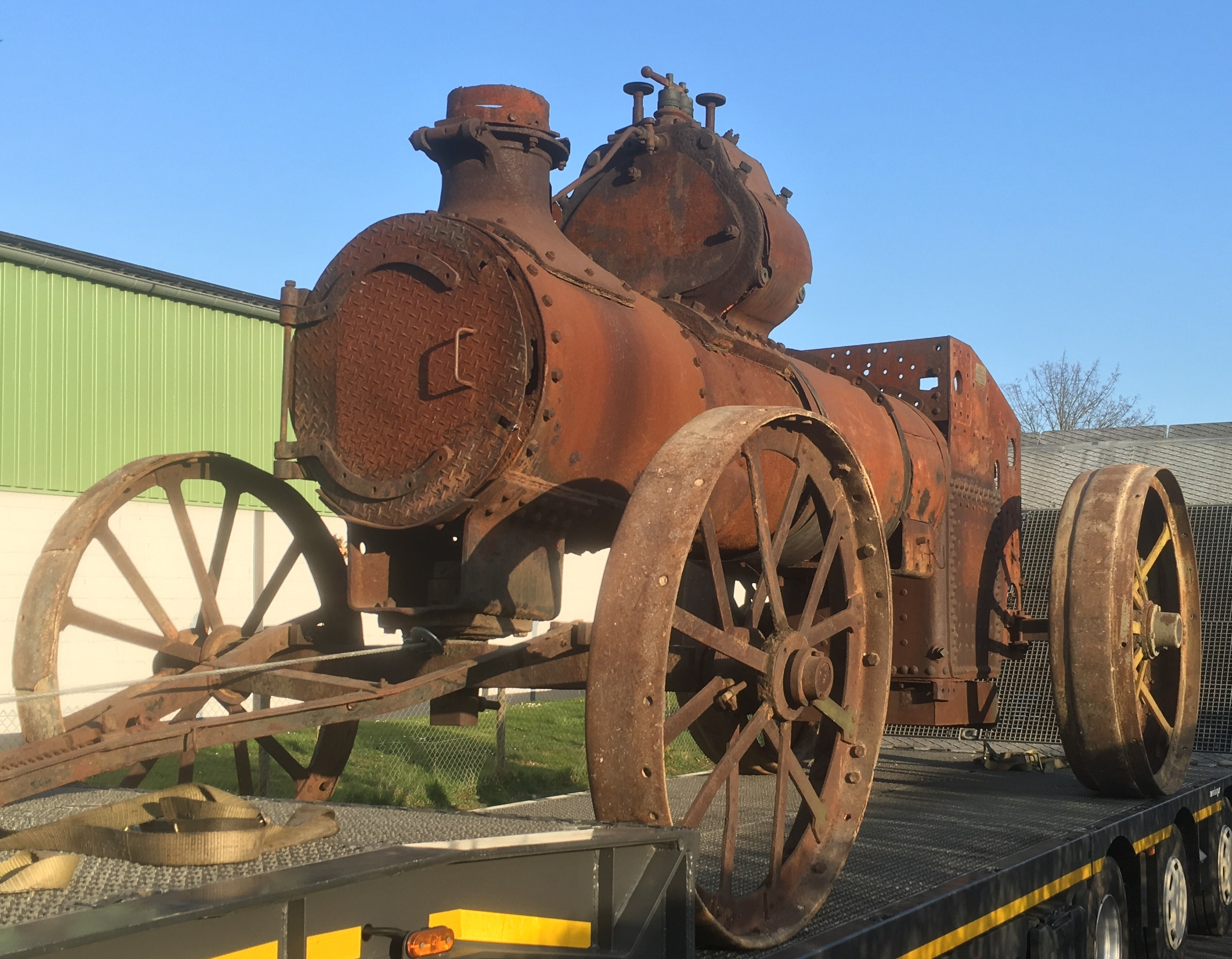 Dampfpfluglokomotive A. Heucke 426/1915 (2017)